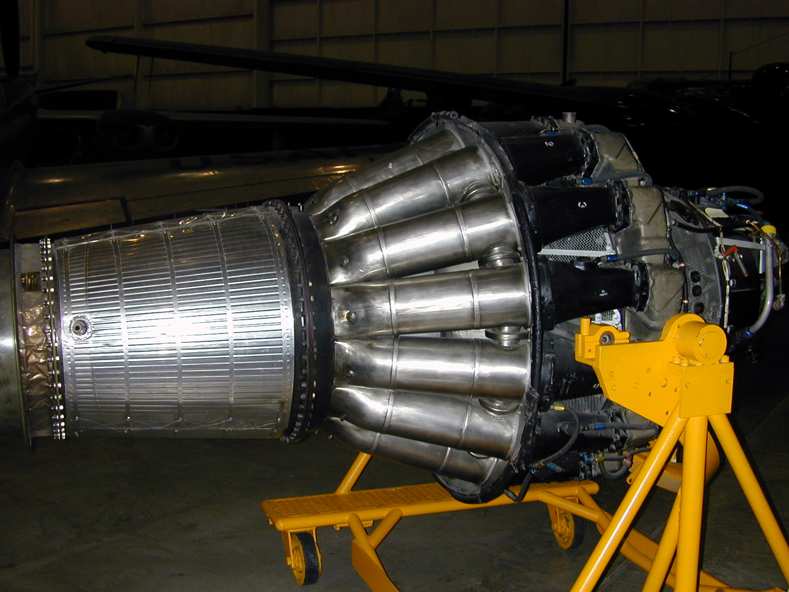 Allison J33 Turbojet Engine